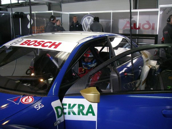 Matteo Cressoni su Audi A4 DTM durante i test di Almeria (Spagna)